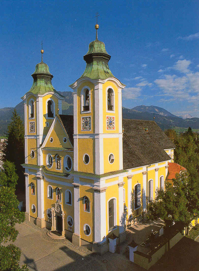 Sankt Johann in Tirol, Dekanatspfarrkirche Mariä Himmelfahrt von Westen.